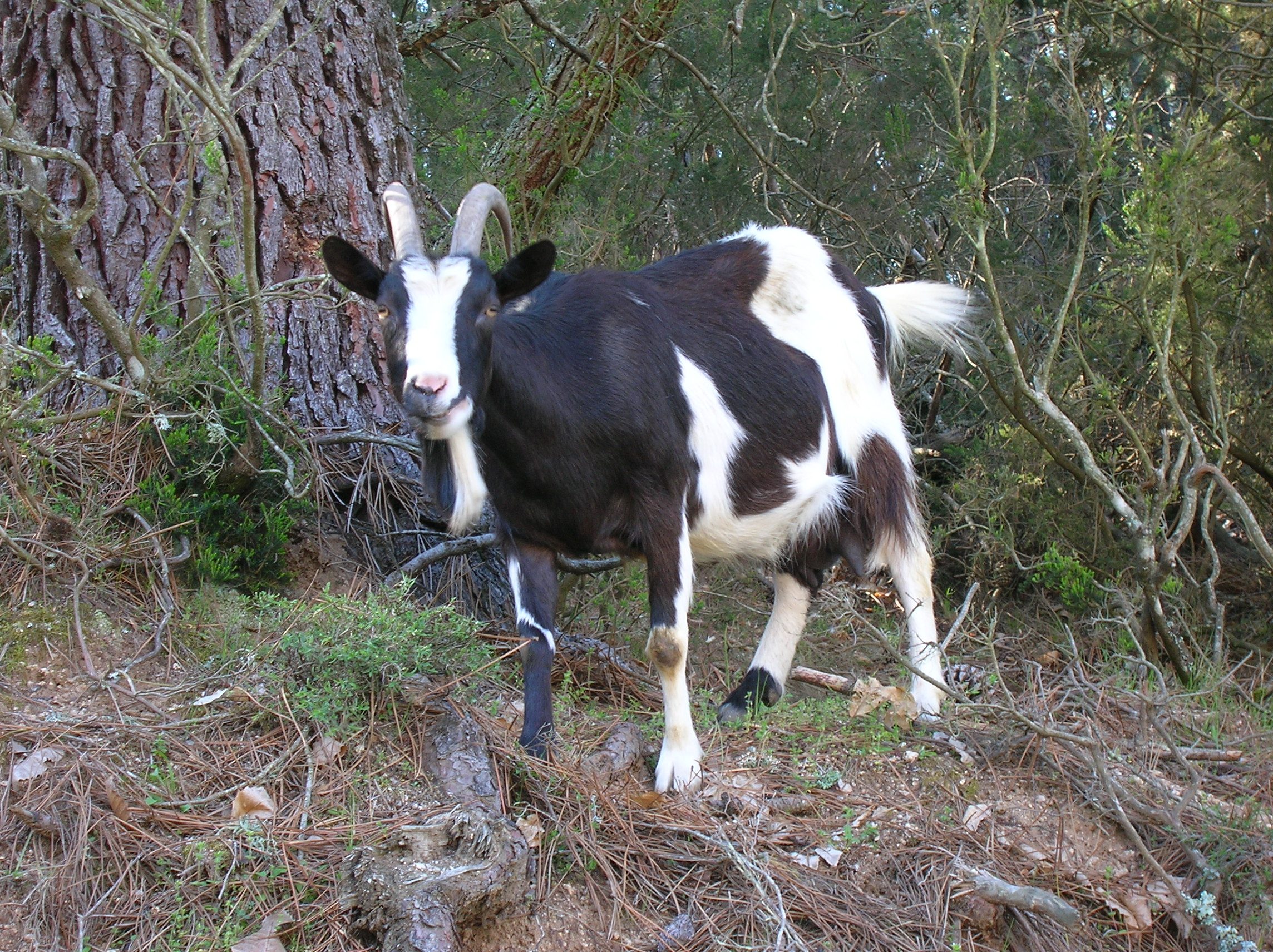 Une chèvre prise en photo à Azzana.